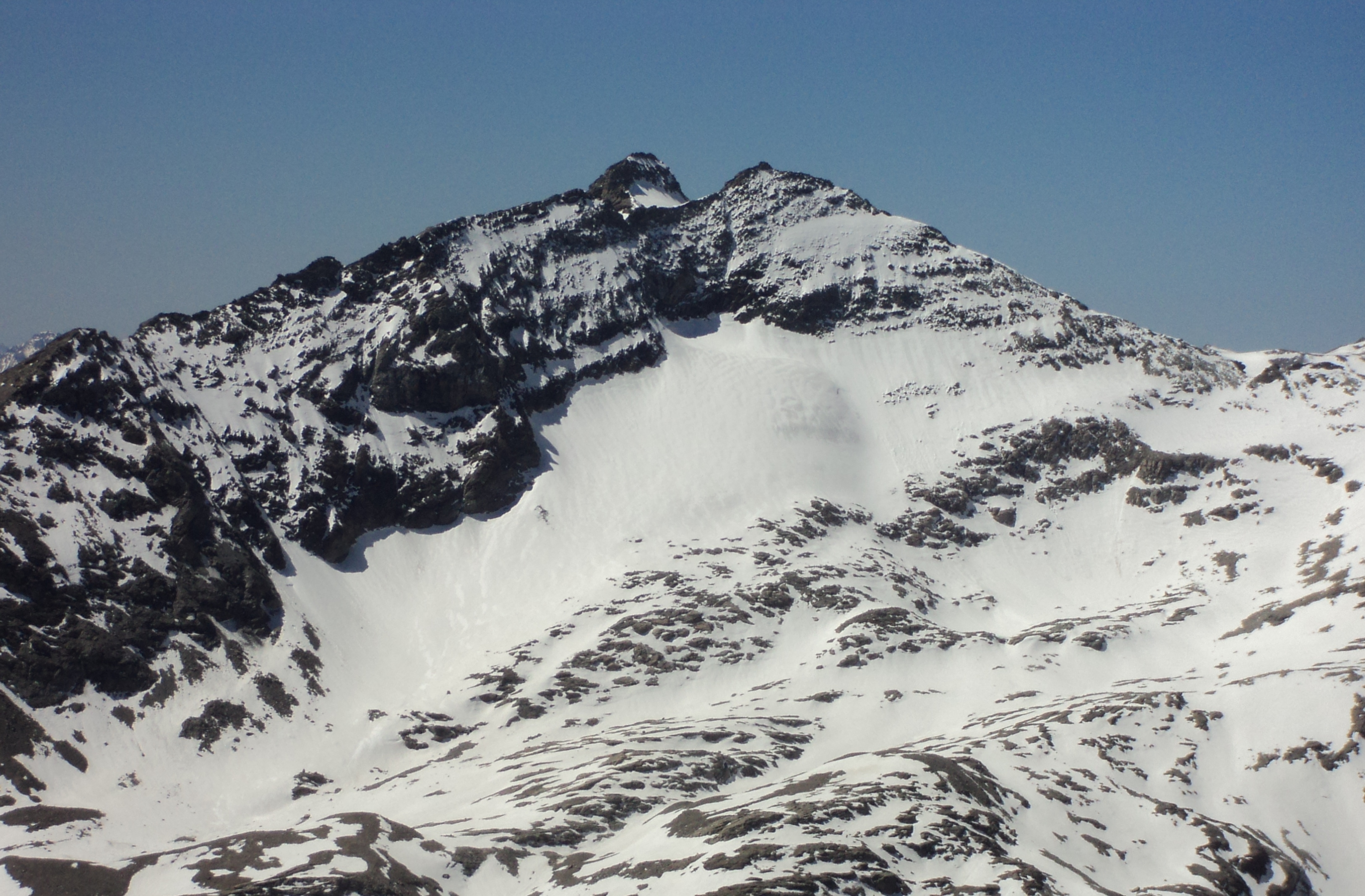 Il Monte Ferrand ed il Monte Niblè visti dal Monte Giusalet (da nord-est) - Alpi Cozie